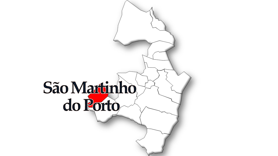 População